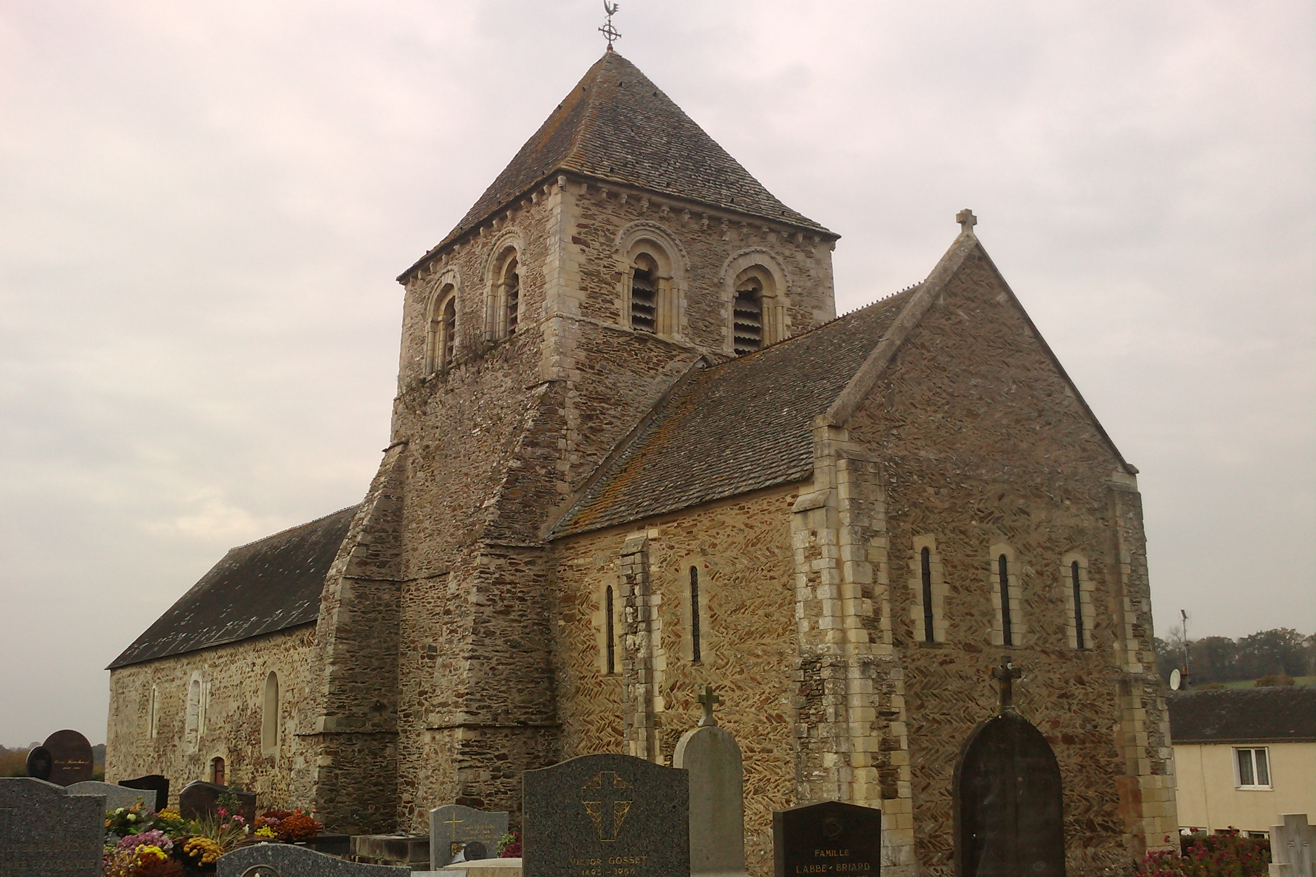 Église Saint-Ébremond de La Barre-de-Semilly en schiste briovérien. La nef et le chœur sont appareillés en arête-de-poisson.